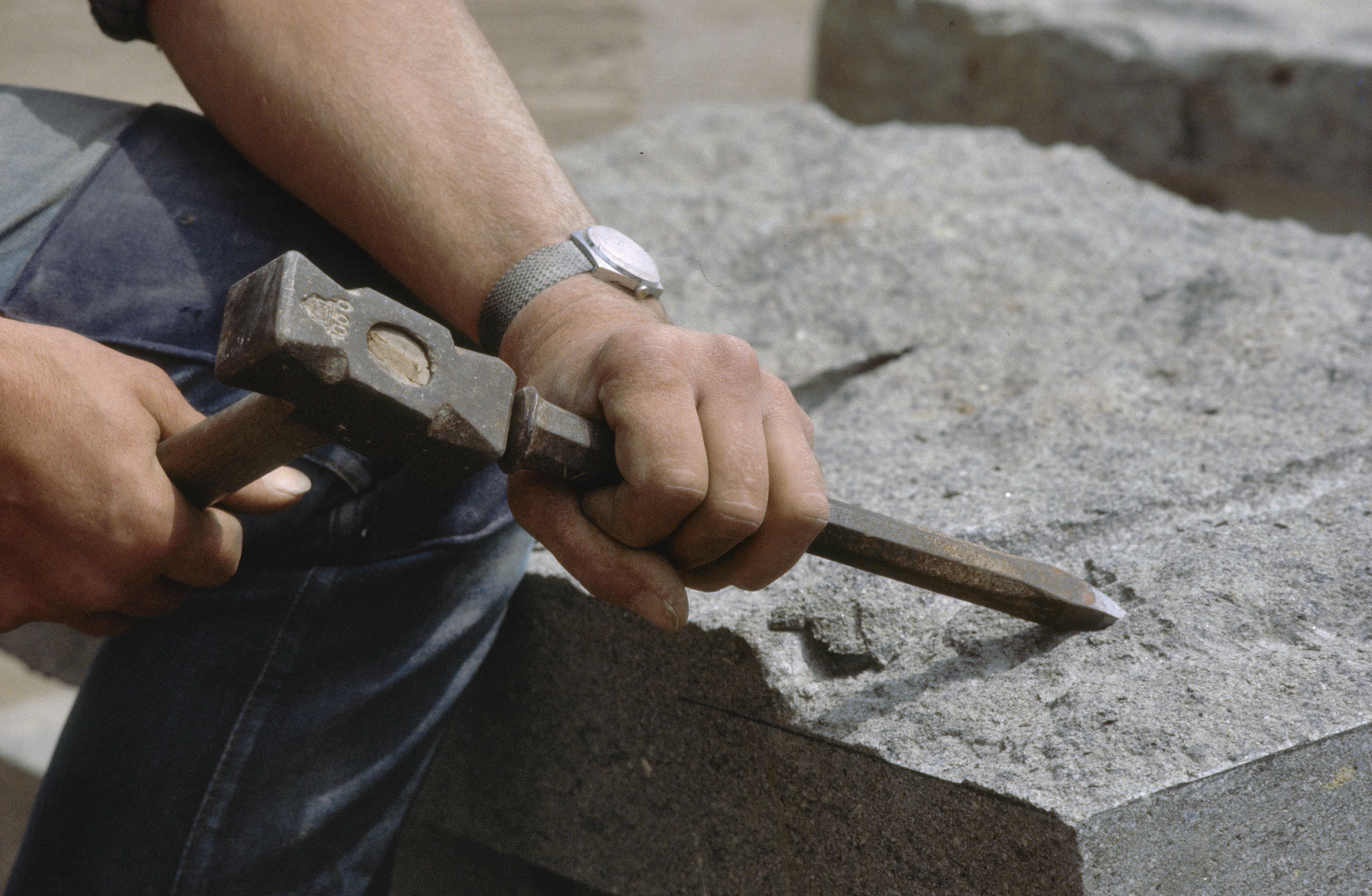 steenhouwerij: spitzen met puntijzer